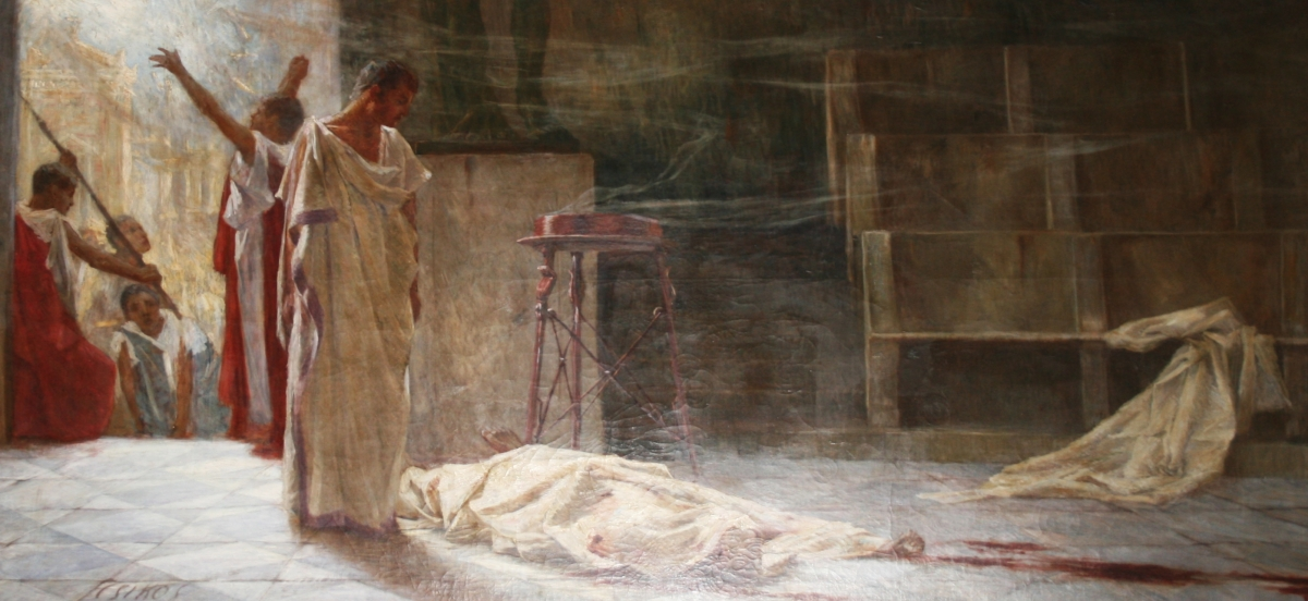 Marko Antonije nad lešinom Cezarovom, rad Bele Čikoša Sesije u Hrvatskom institutu za povijest u Zagrebu